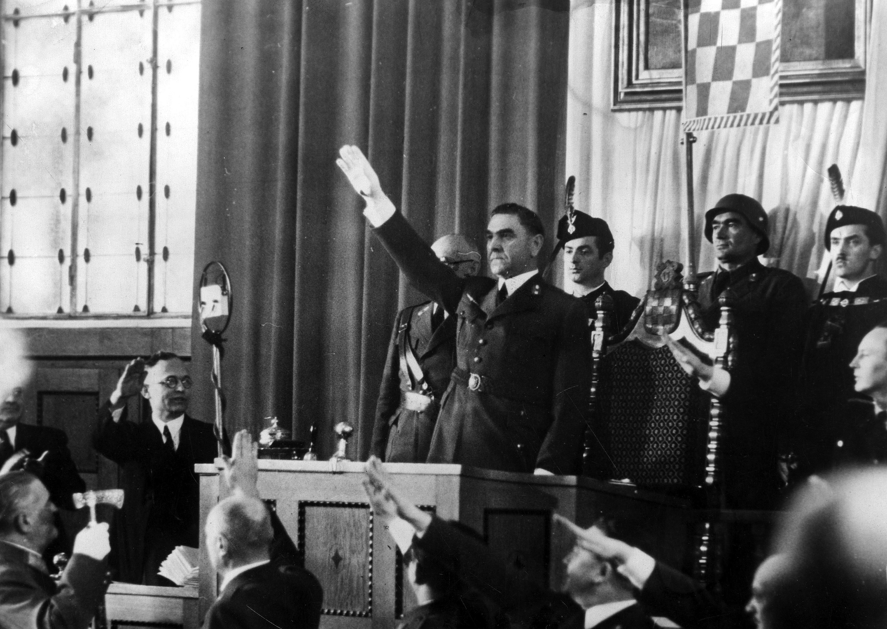 Przywódca państwa chorwackiego Ante Pavelić pozdrawia członków parlamentu.